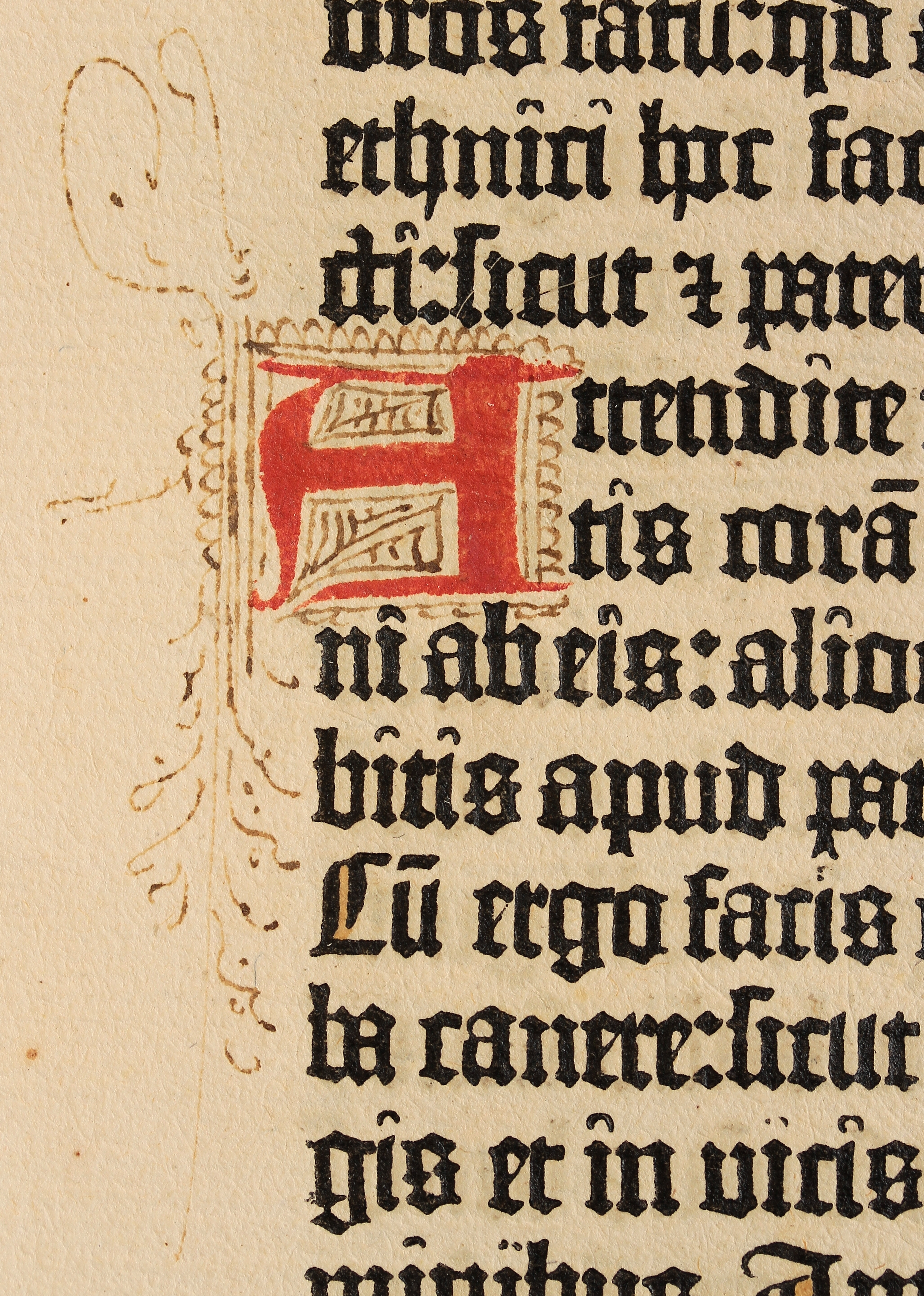 Descripción bibliográfica: Biblia Latina. - [Moguntiae : Tip. epónima (=Johannes Gutenberg),(c. 1454- agosto, 1456]) . - 128 h.; fol. - Sin sign. ni fol. - L. gót. --2 col. --42 lín. --Esp. p. inic. --Tinta roja y negra. Impresor: Gutenberg, Johannes, imp. Lugar de impresión: Alemania. Mainz Procedencia: Jesuitas. Casa Profesa de Sevilla. Otro título: Biblia de las 42 líneas Otro título: Biblia de Gutenberg Localización: Libro completo